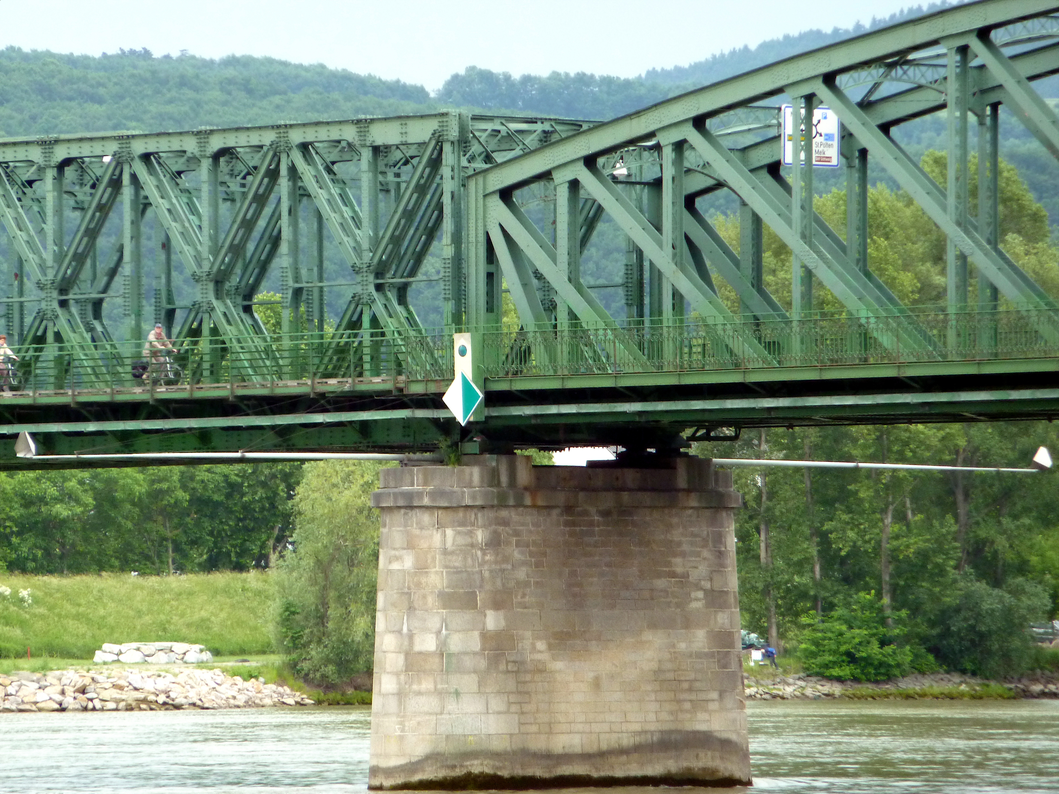 Donaubrücke, Mautern an der Donau / Stein (Krems), Niederösterreich - rechts vom Pfeiler der 1895 errichtete, links der 1945 errichtete Teil; Bereich in dem sich im August 2013 ein Lagerbock verschob (Hitzeschaden) und so zu einer Absenkung der Brücke um 7 cm führte.